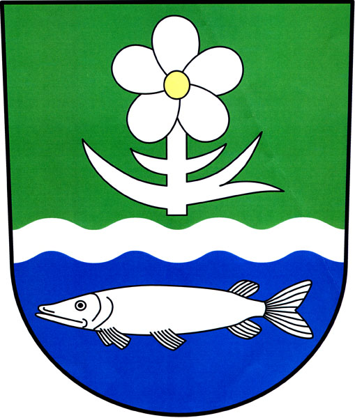 Znak obce Tetčice